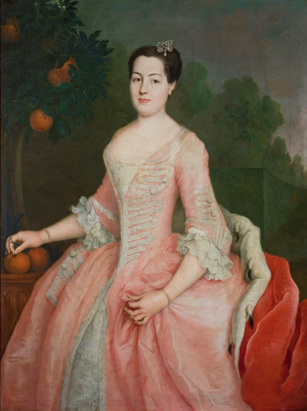 Prinzessin Anna Wilhelmine von Anhalt-Dessau (1715-1780), Bauherrin von Schloss Mosigkau.